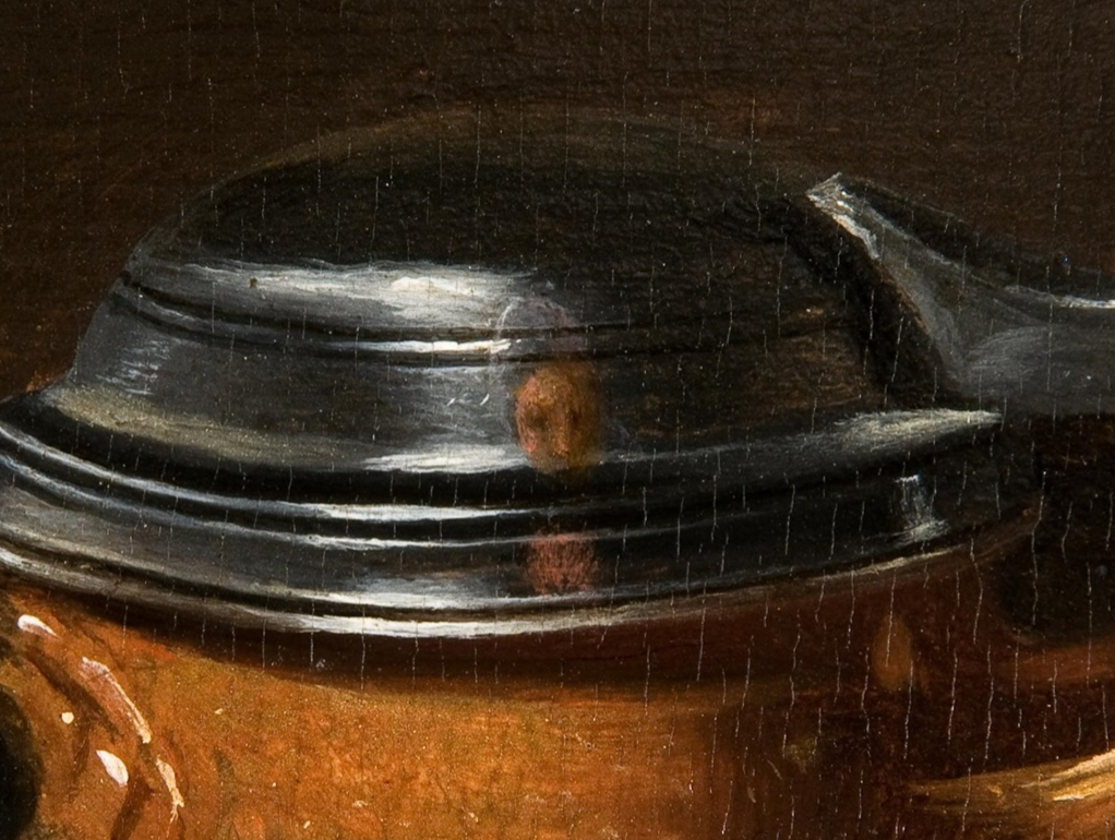 detail: Self-portrait